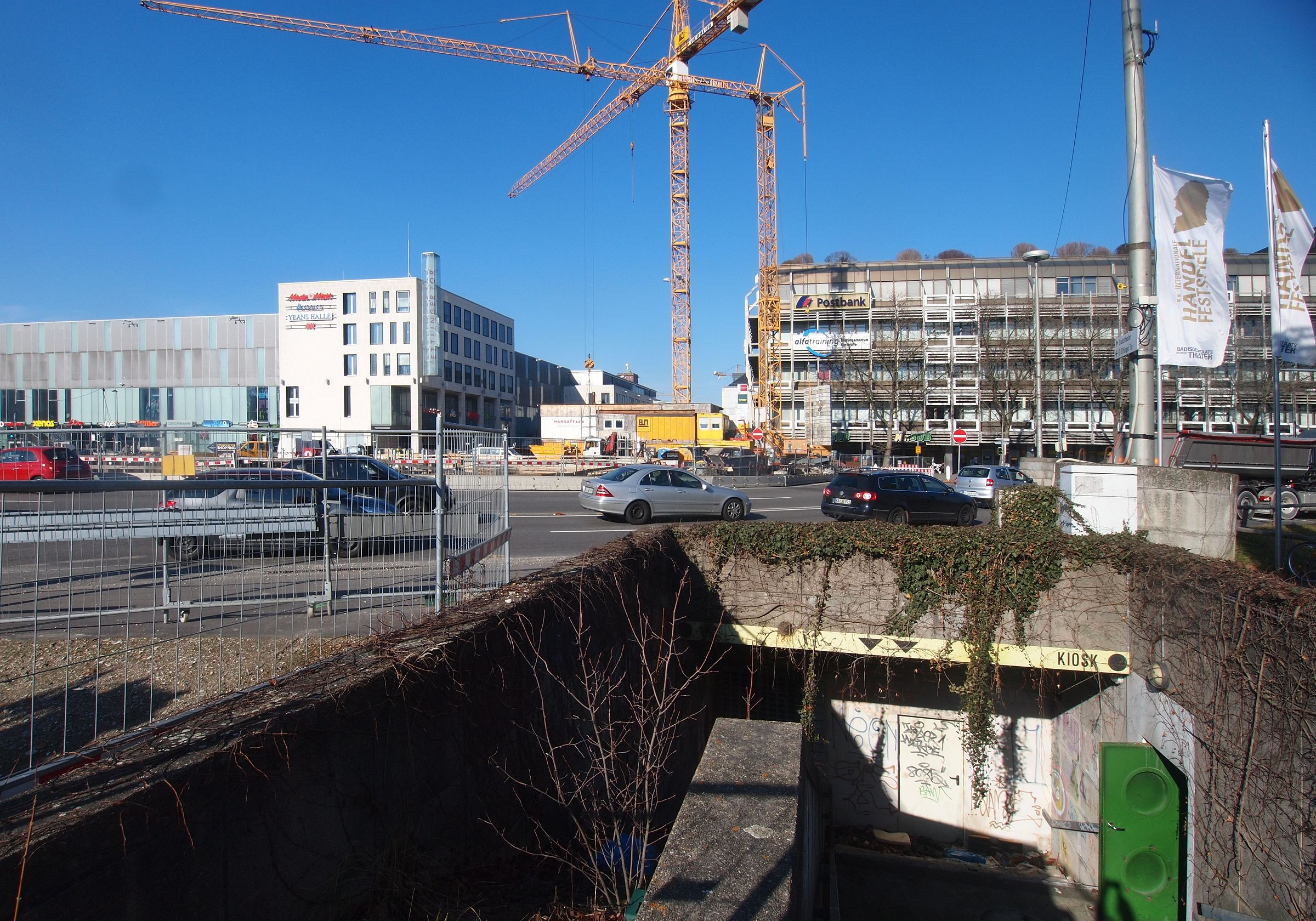 Baustelle am Ettlinger Tor, Abgang der alten Unterführung mit Kiosk und WC